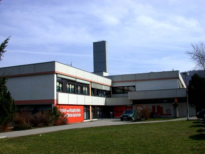 Copyright durch Herrn Stefan Rieger, Internetbeauftragter der Stadt Aalen, freigegeben.